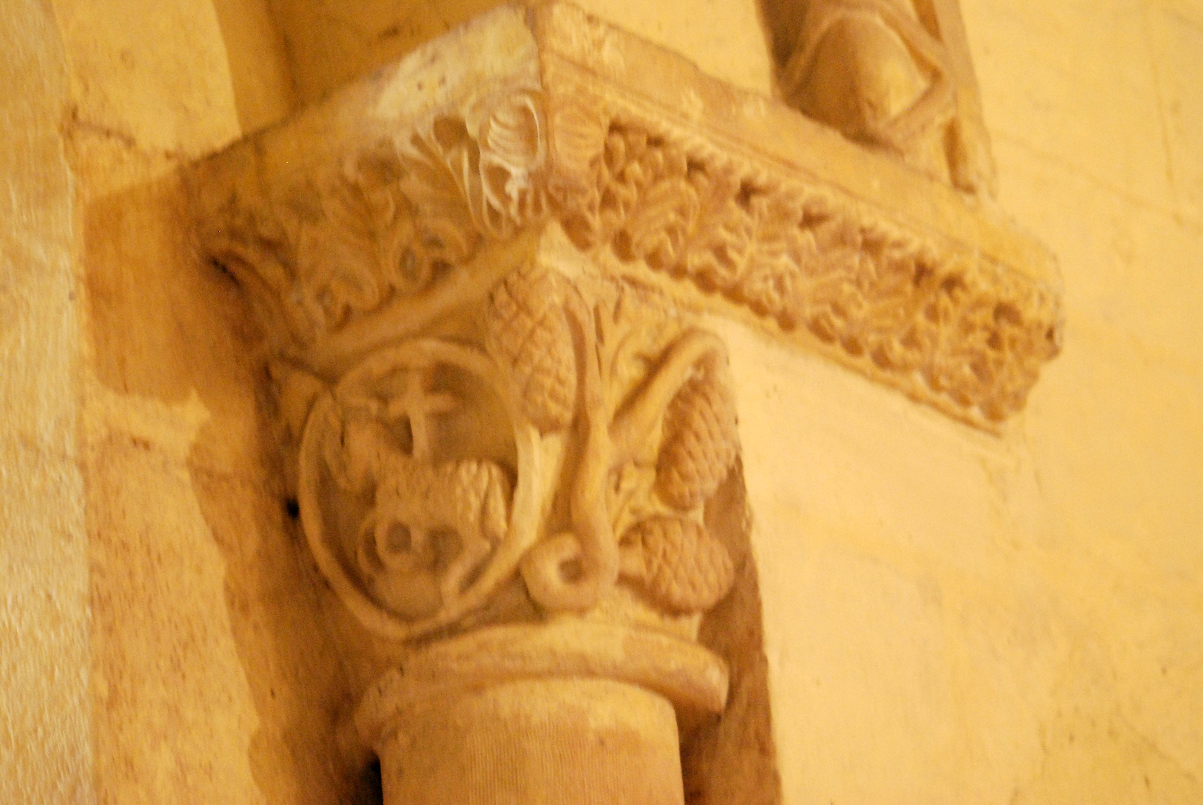 Targon église St Romain